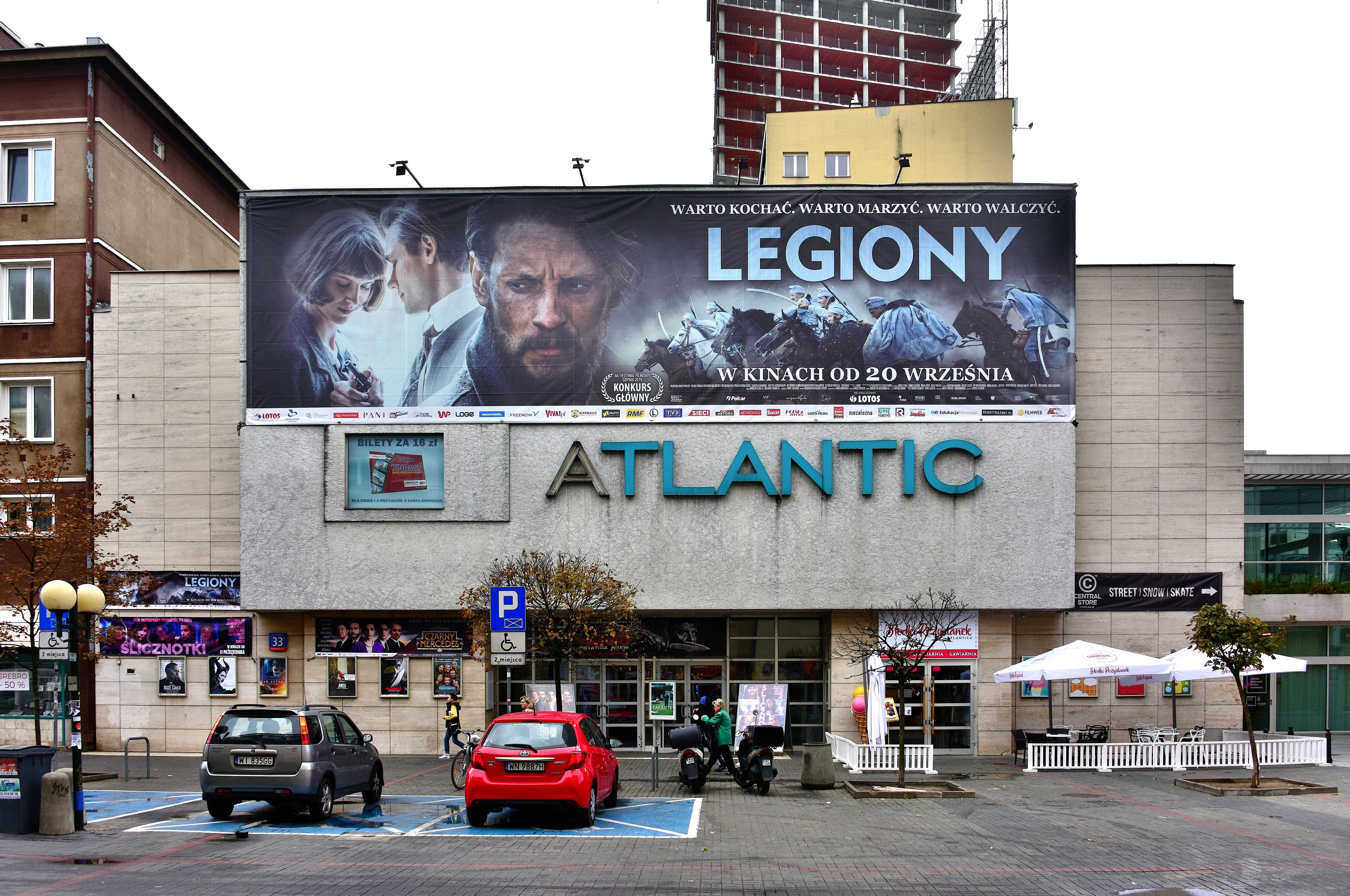 Kino Atlantic przy ul. Chmielnej 33 w Warszawie